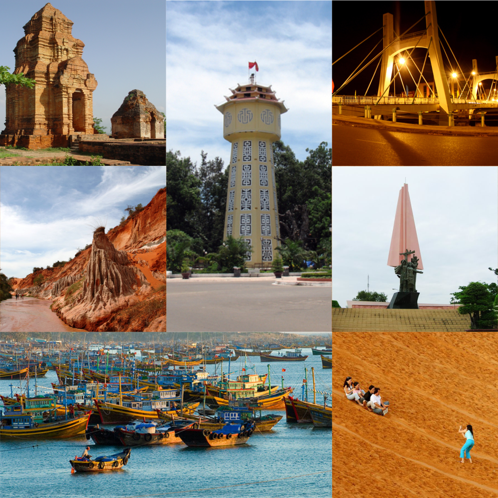 minh họa cho bài viết Phan Thiết